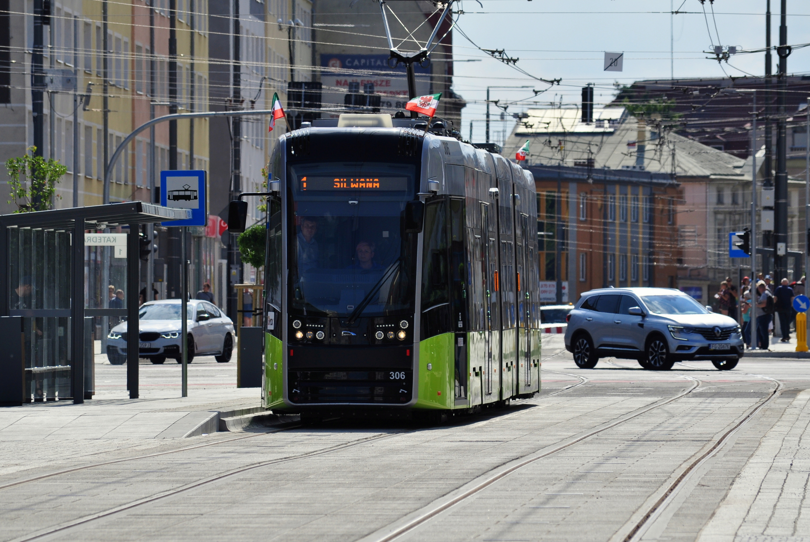 Gorzów Wlkp., tramwaj typu PESA Twist 2015N linii 1. Po trzyletniej przerwie, w czwartek 2 lipca 2020 r. na gorzowskie tory wróciły tramwaje.